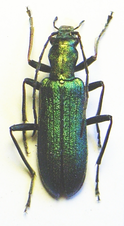 Chysanthia viridissima, female?